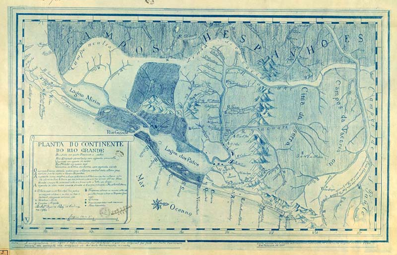 Planta do Continente do Rio Grande, divididos em quatro províncias a saber